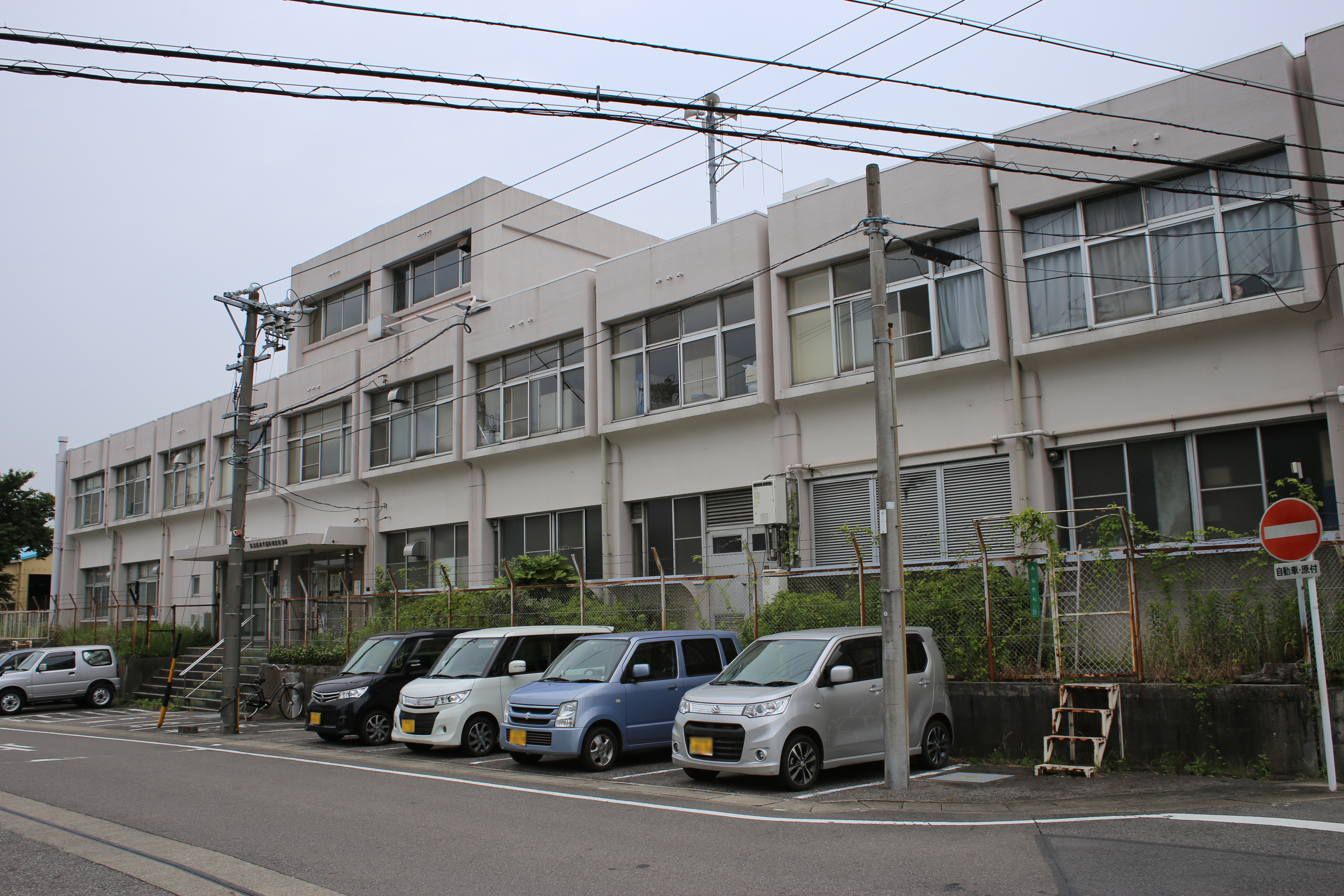 名古屋市北区丸新町の名古屋市営バス如意営業所を北側公道西側より撮影。ただし、ナンバープレートにつき画像処理済。